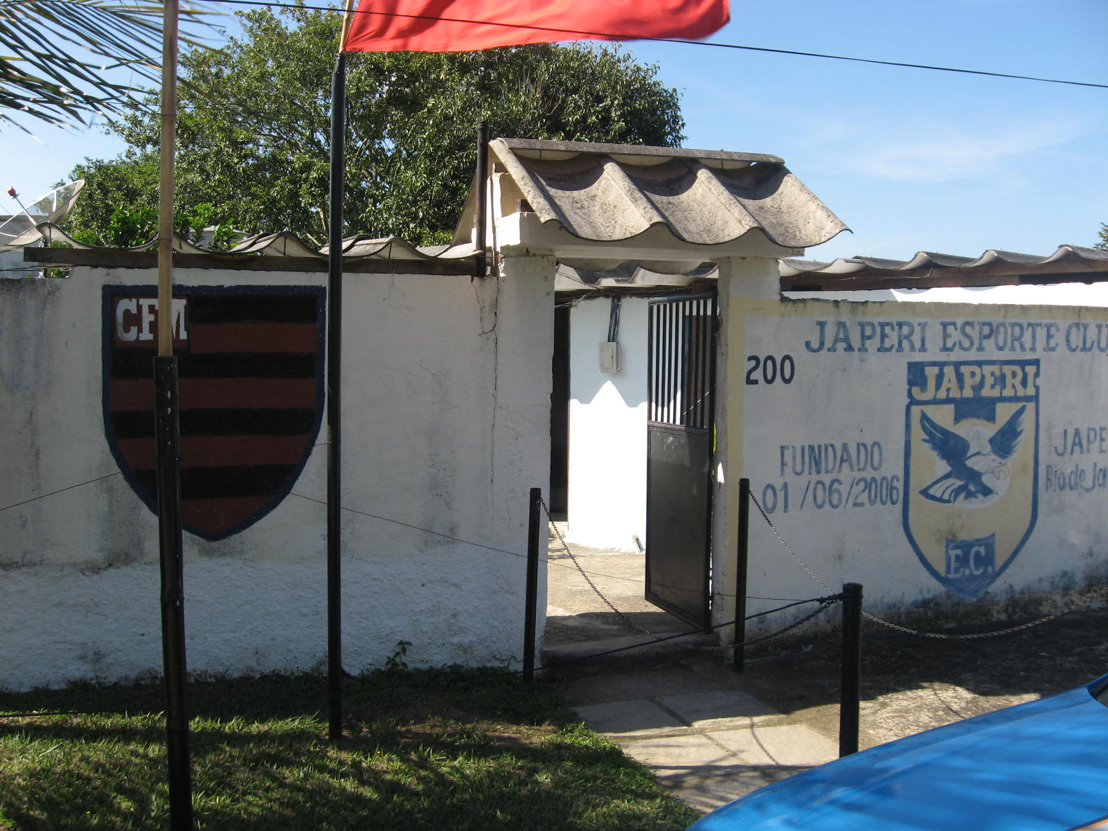 Estádio Eduardo Viana, campo do CFM, em Engenheiro Pedreira, em Japeri.